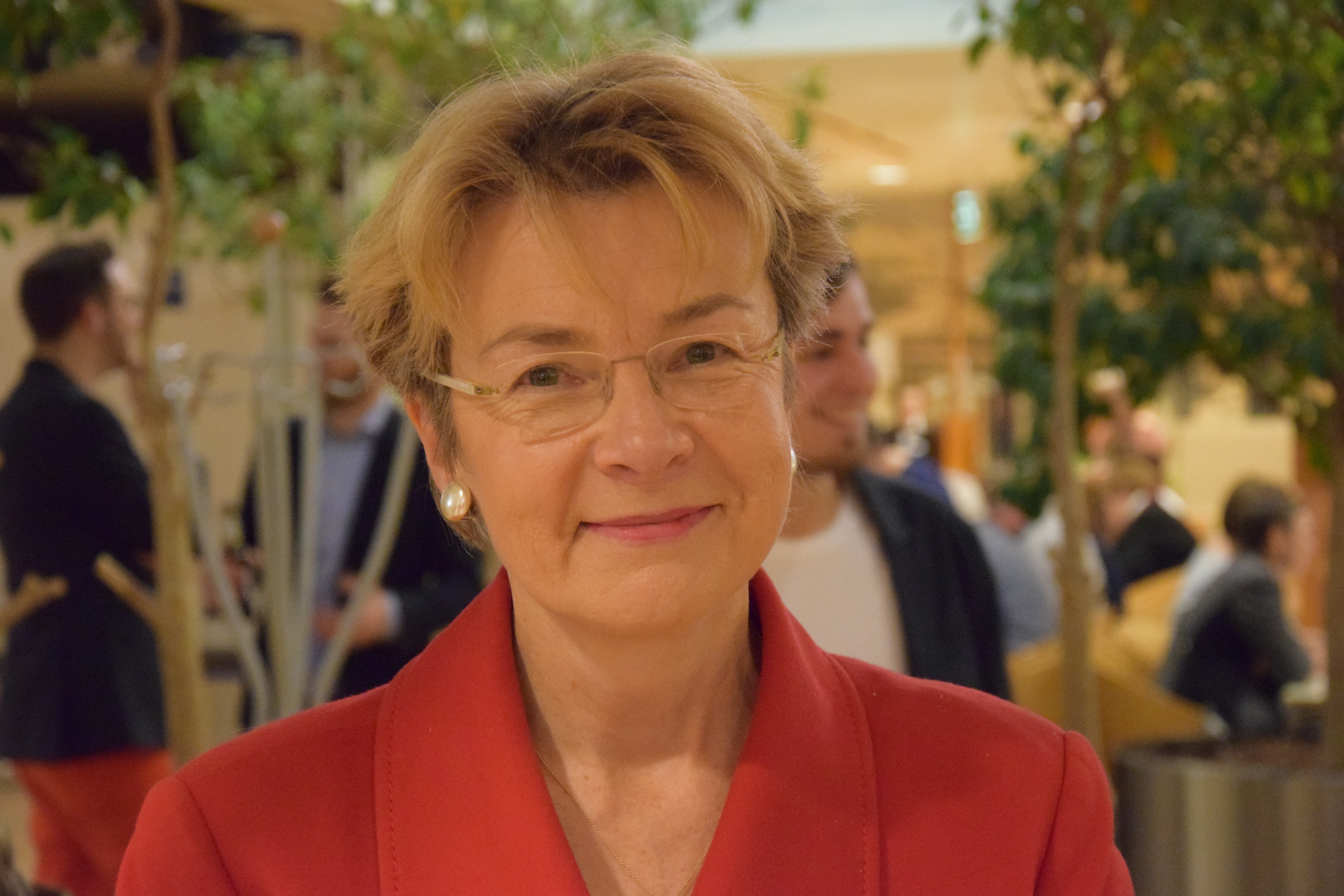 Anja Hertel (* 1961), deutsche Politikerin (SPD), Mitglied des Abgeordnetenhauses von Berlin